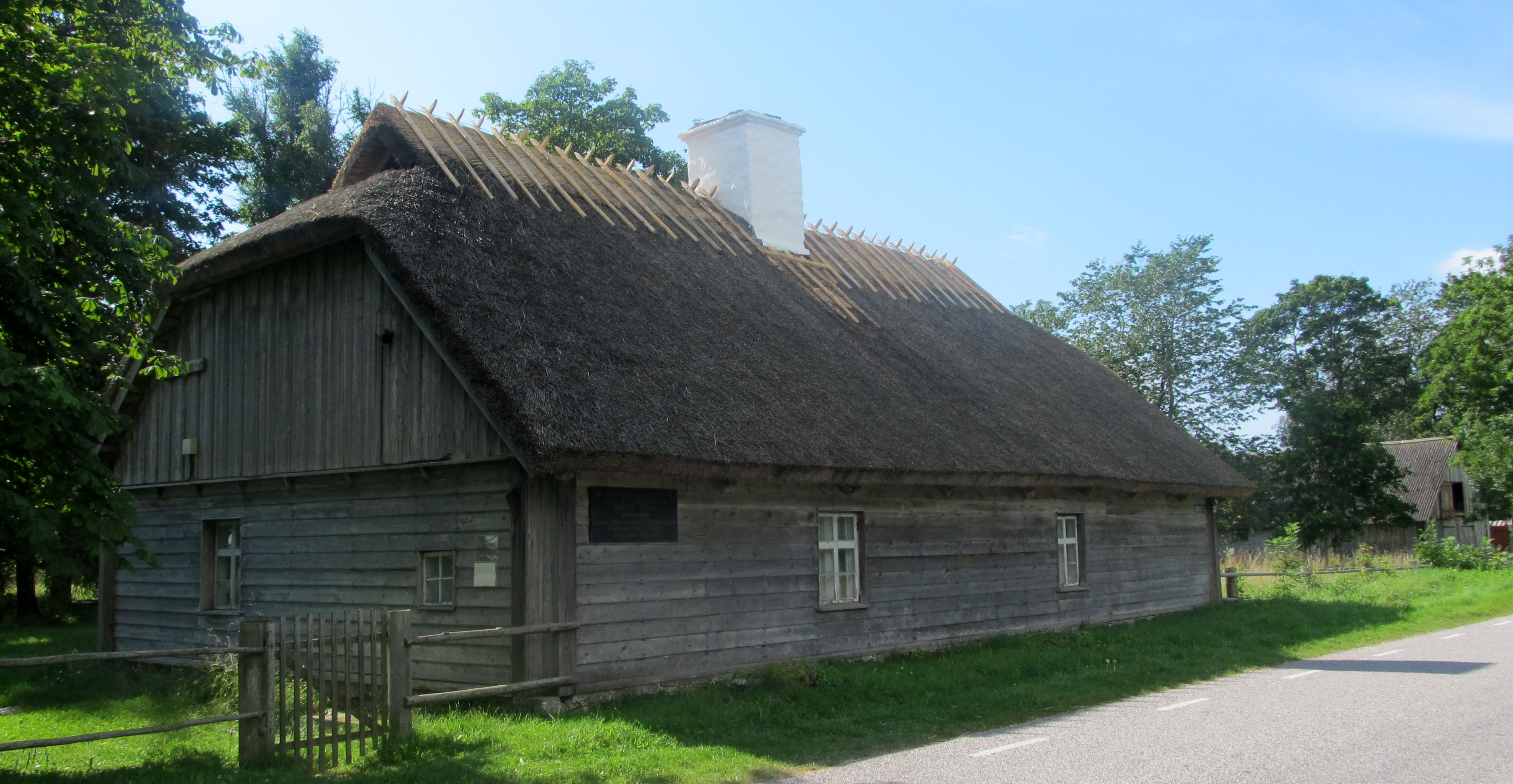 Rudolf Tobiase sünnimaja